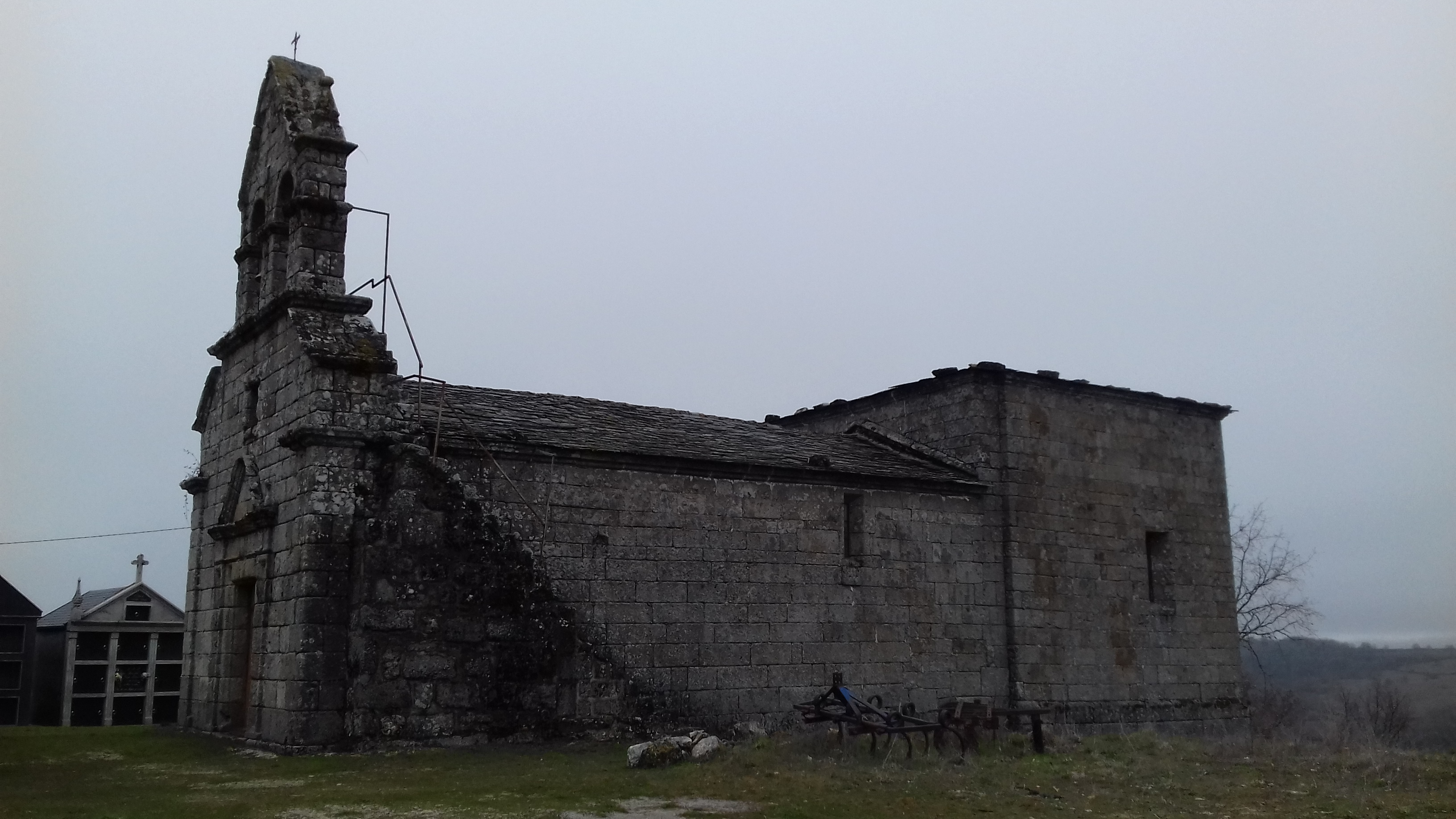 Igrexa parroquial de Pradolongo, A Veiga